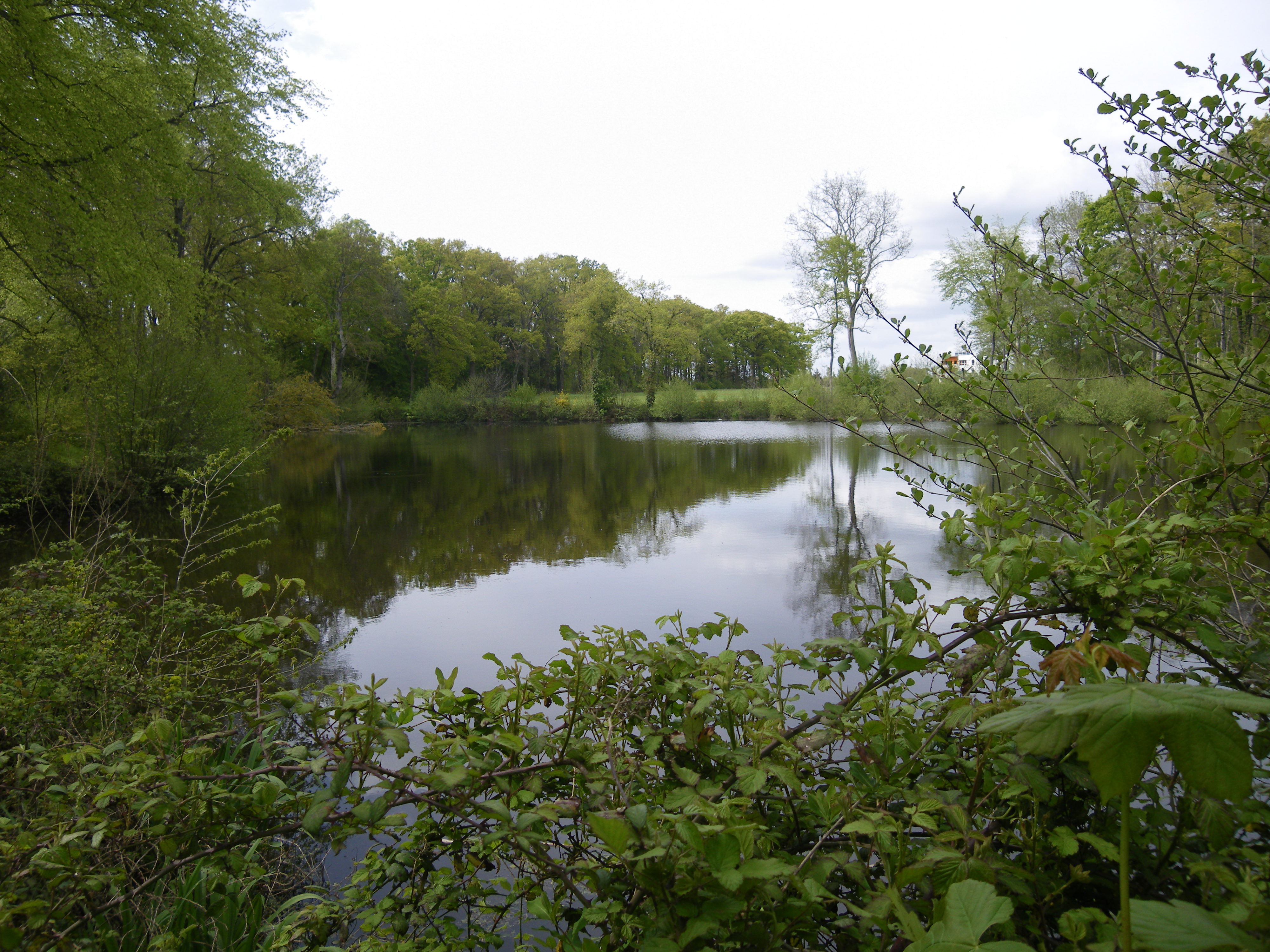 etang a orgeres